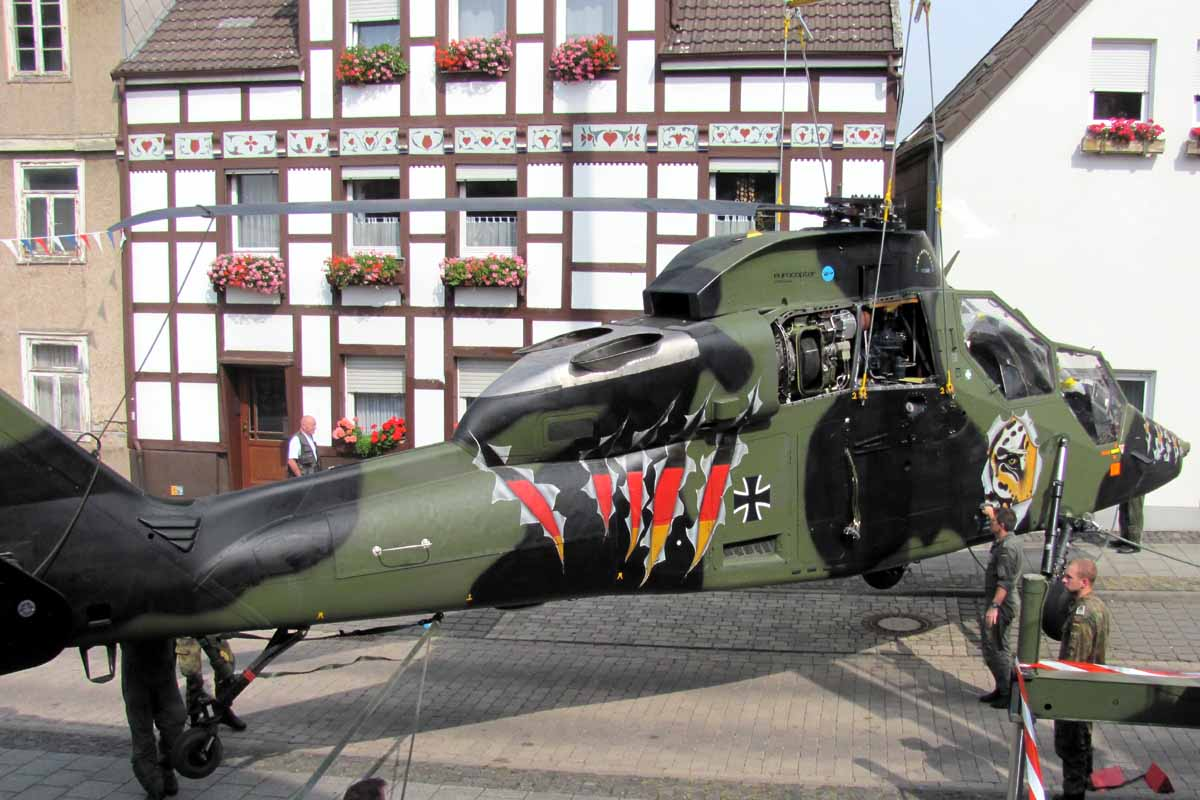 Der Prototyp 3 des Eurocopter EC-665 TIGER wird in die Ausstellungshalle des Hubschraubermuseums Bückeburg gebracht